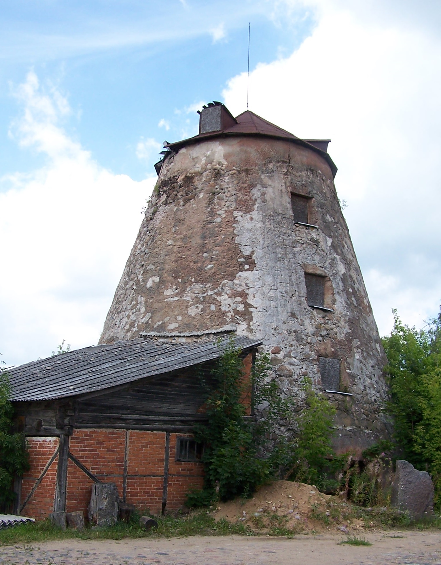 Šmidto malūnas